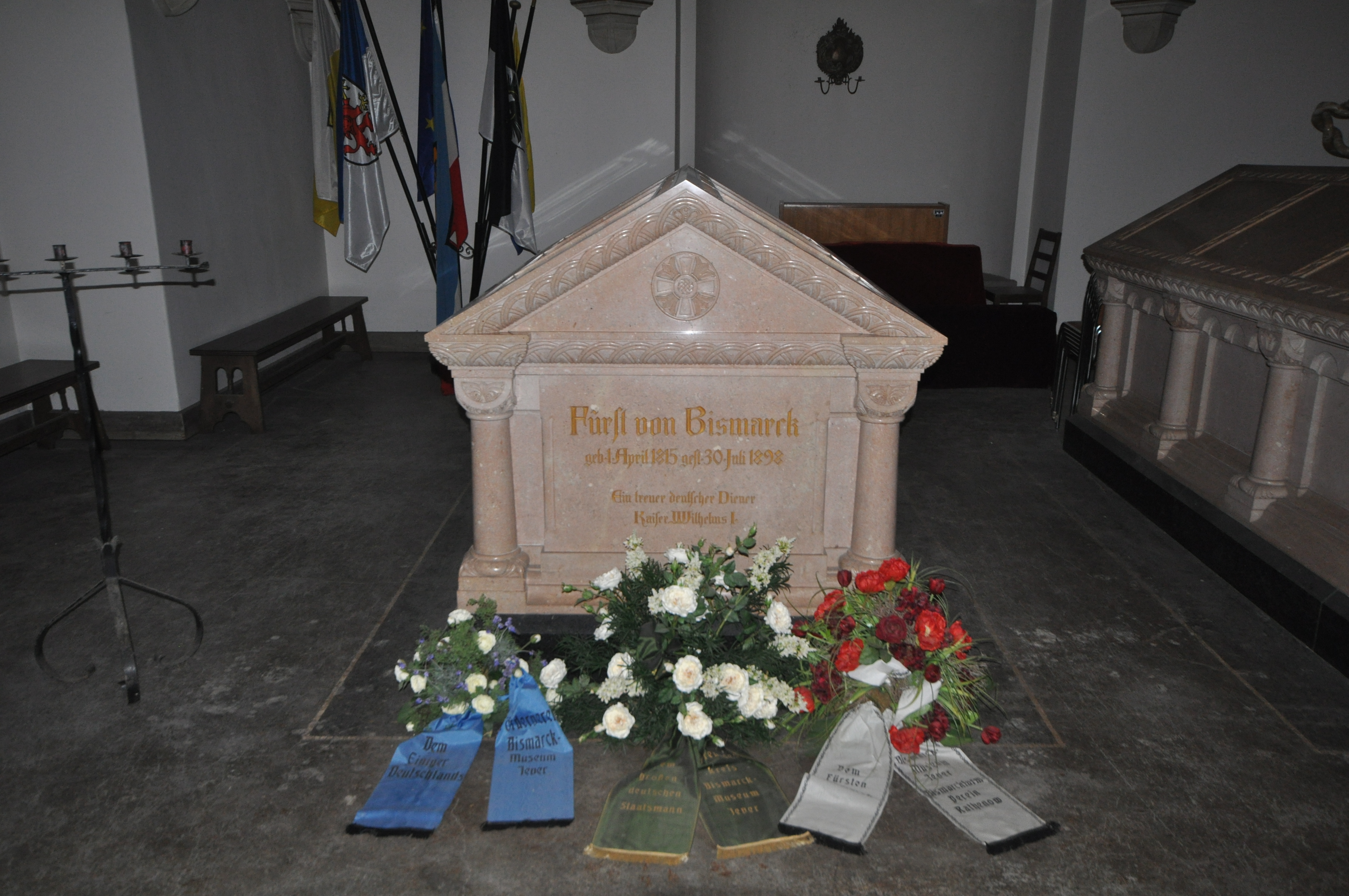 Sarkophag von Otto Fürst von Bismarck